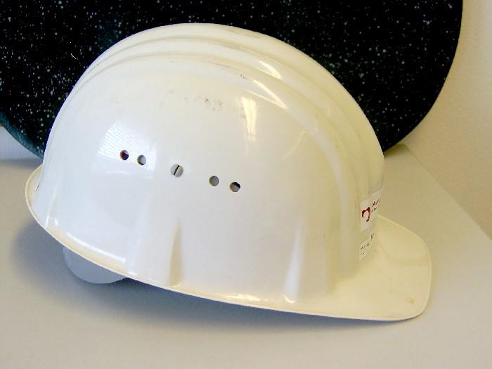 Beschreibung: moderner, industrieller Schutzhelm Quelle: Selbst fotografiert am 17.08.2005 Fotograf oder Zeichner: Benutzer:OldCrow